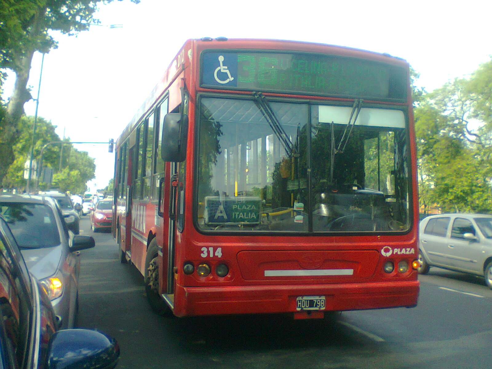 Unidad 314 de la línea 36 de Buenos Aires